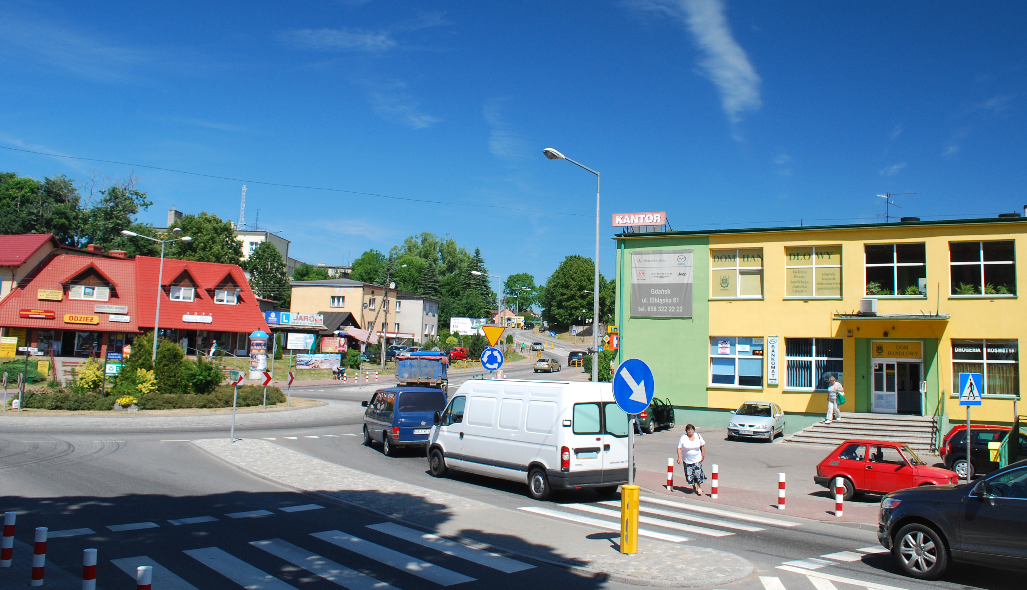 Ul. Gdańska w Żukowie